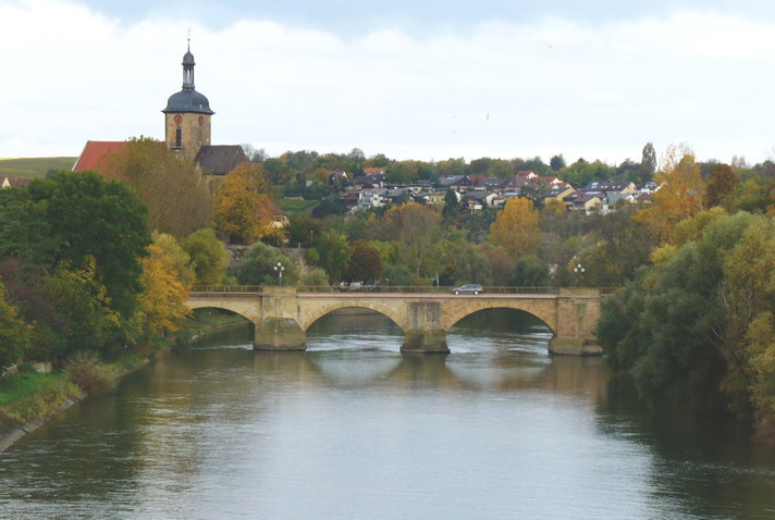 Lauffen am Neckar Neckarbrücke selbst fotografiert am 23.10.2005 von user:Enslin